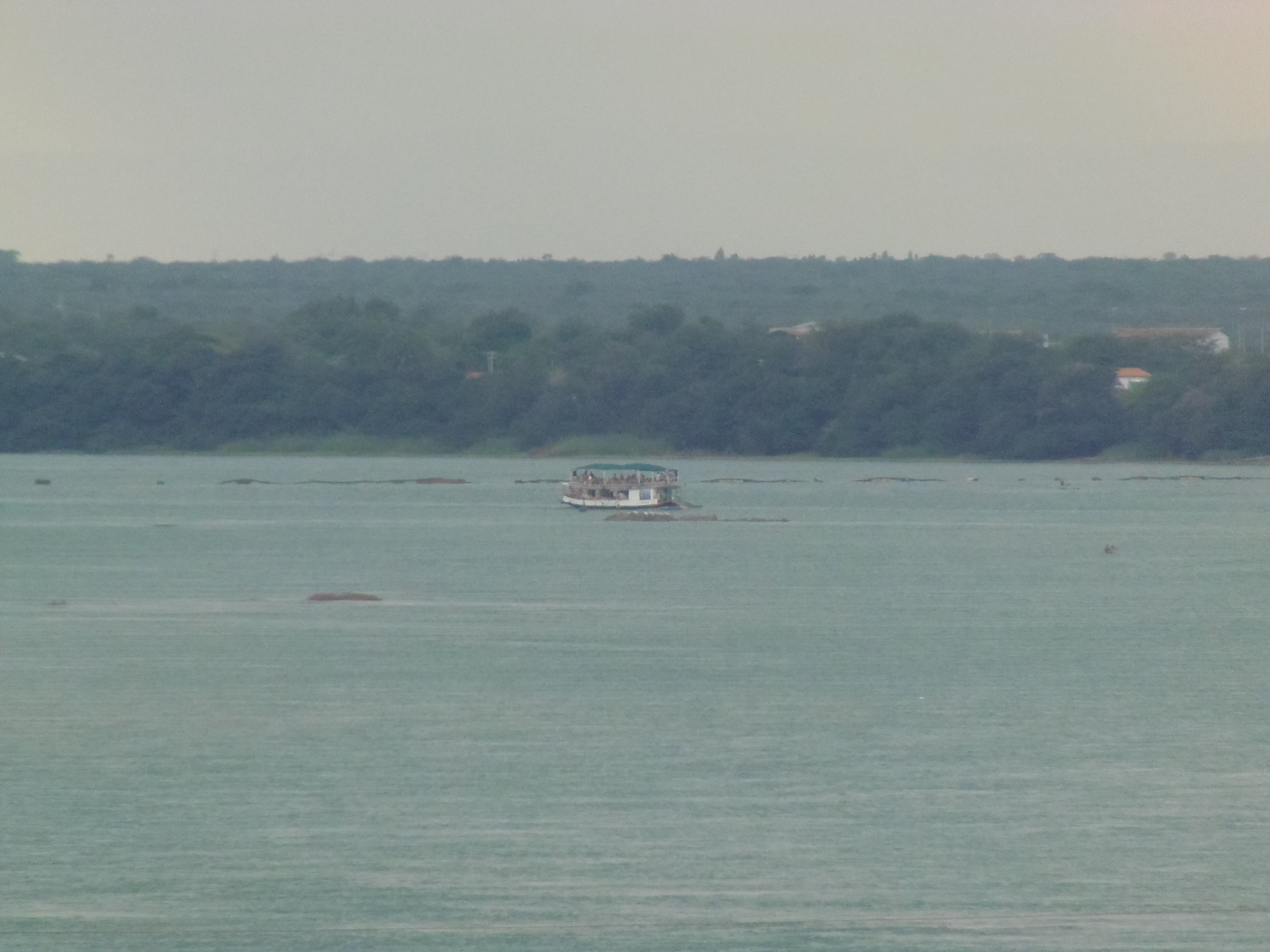 COHAB São Francisco, Petrolina - PE, Brazil